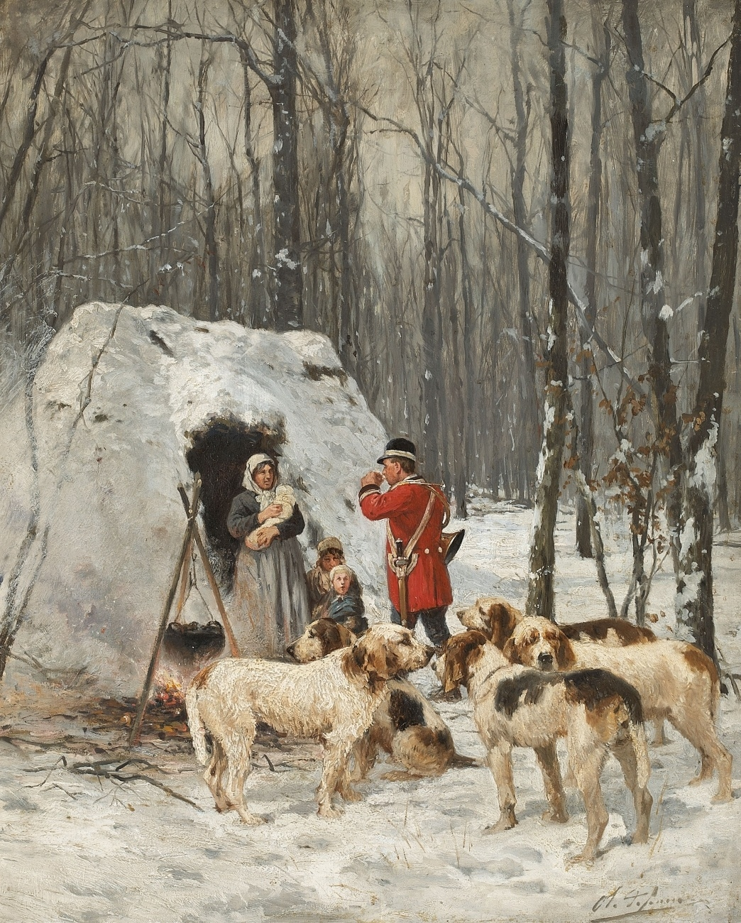 Jagdszene im Winter.